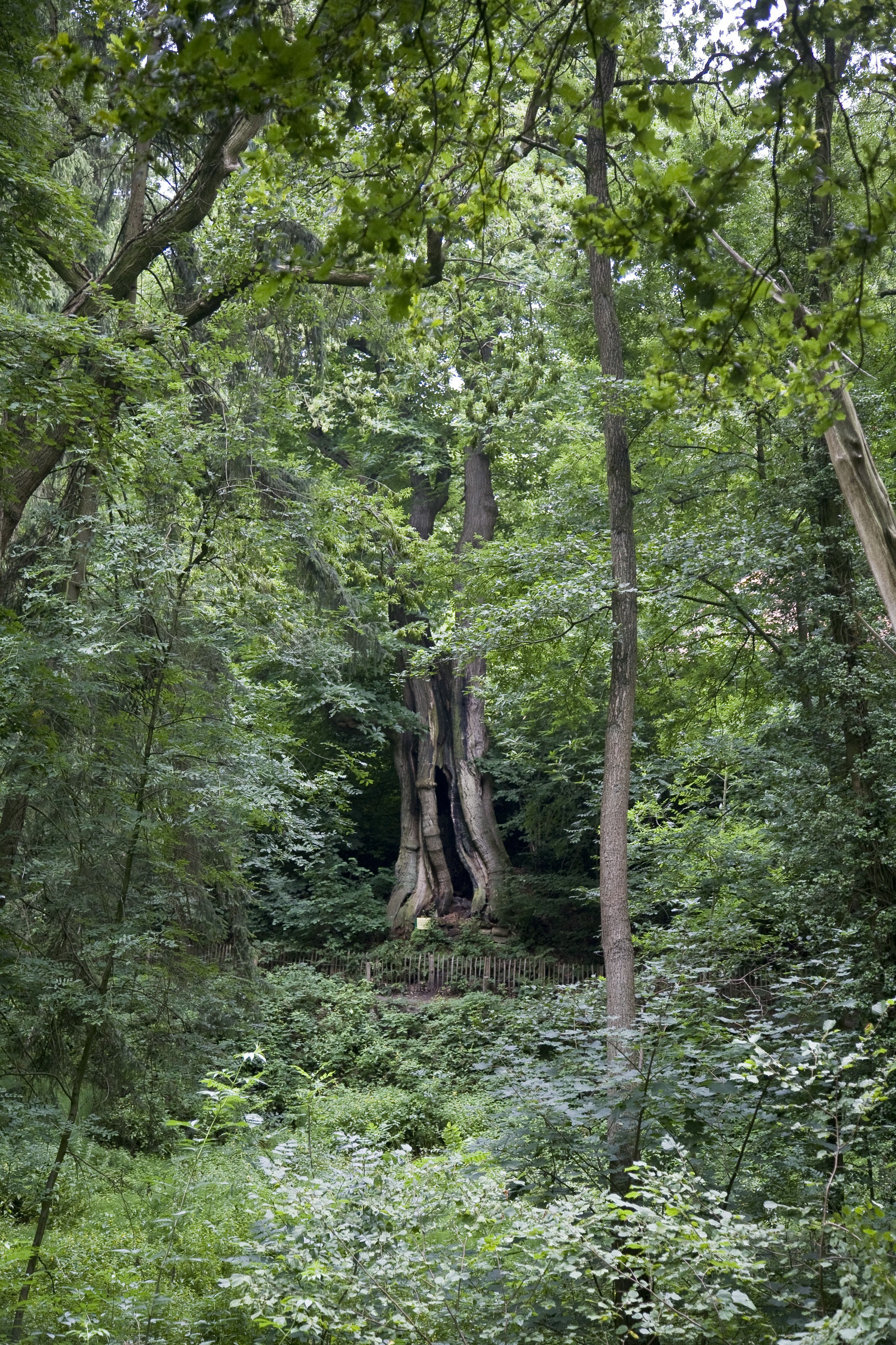 Boom: Zicht op de Kabouterboom, een tamme kastanje en de dikste boom van Nederland (opmerking: Publicatie TRAP route Berg en Dal)